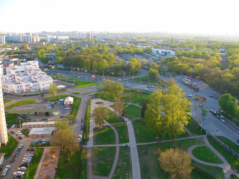 Verhnie Polia Street. Moscow, Russia